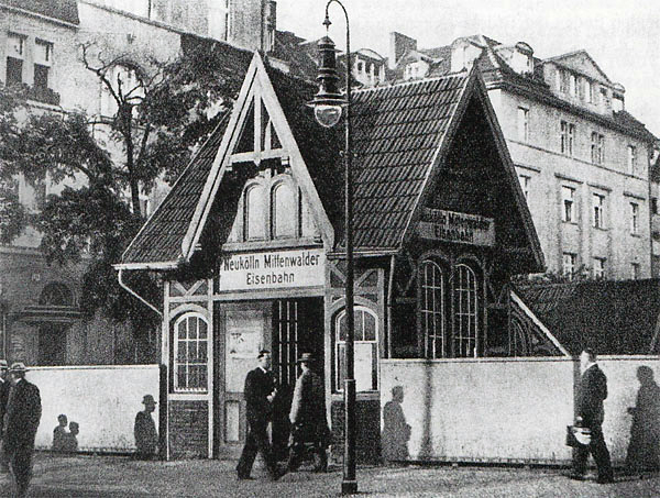 Empfangsgebäude der Neuköllln-Mittenwalder Eisenbahn - Bahnhof Hermannstrasse